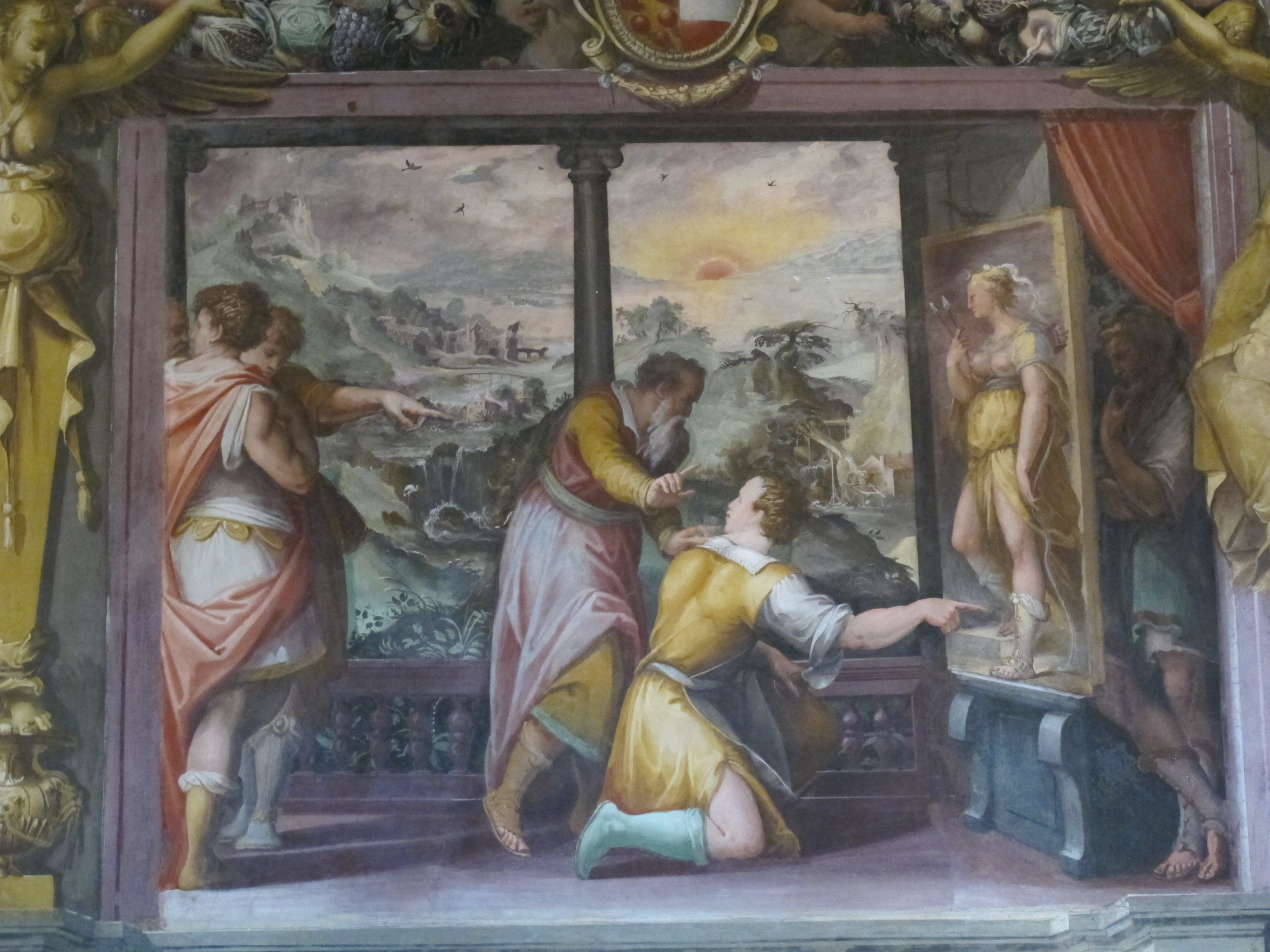 Casa vasari FI, salone, storie di apelle